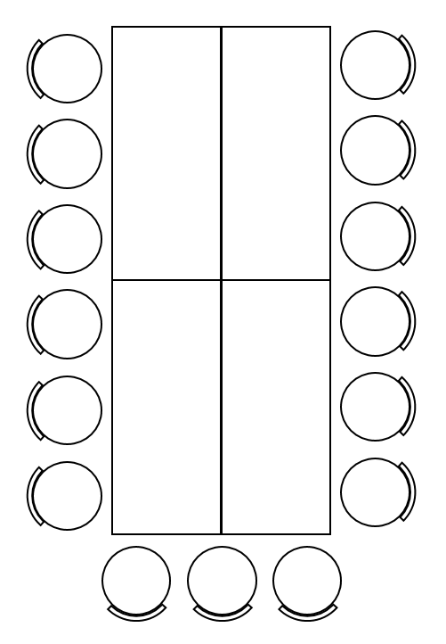 Bordoppsett Kongebord konferanse